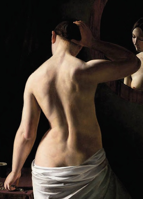 Sally Henriques' maleri "Kvindelig model stående foran et spejl", 1841.